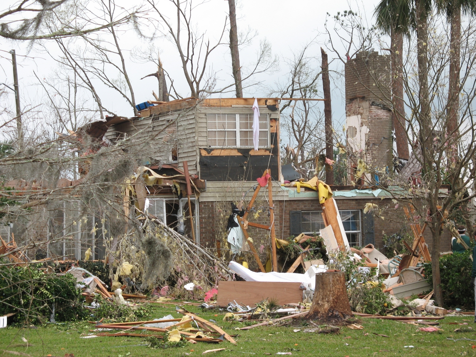 Tornado damage in Deland, Florida.